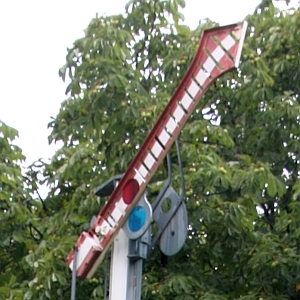 Bayerisches Hauptsignal